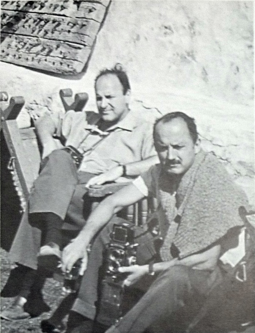 J.A. Corrales y R. V. Molezún. 1968. Canarias.